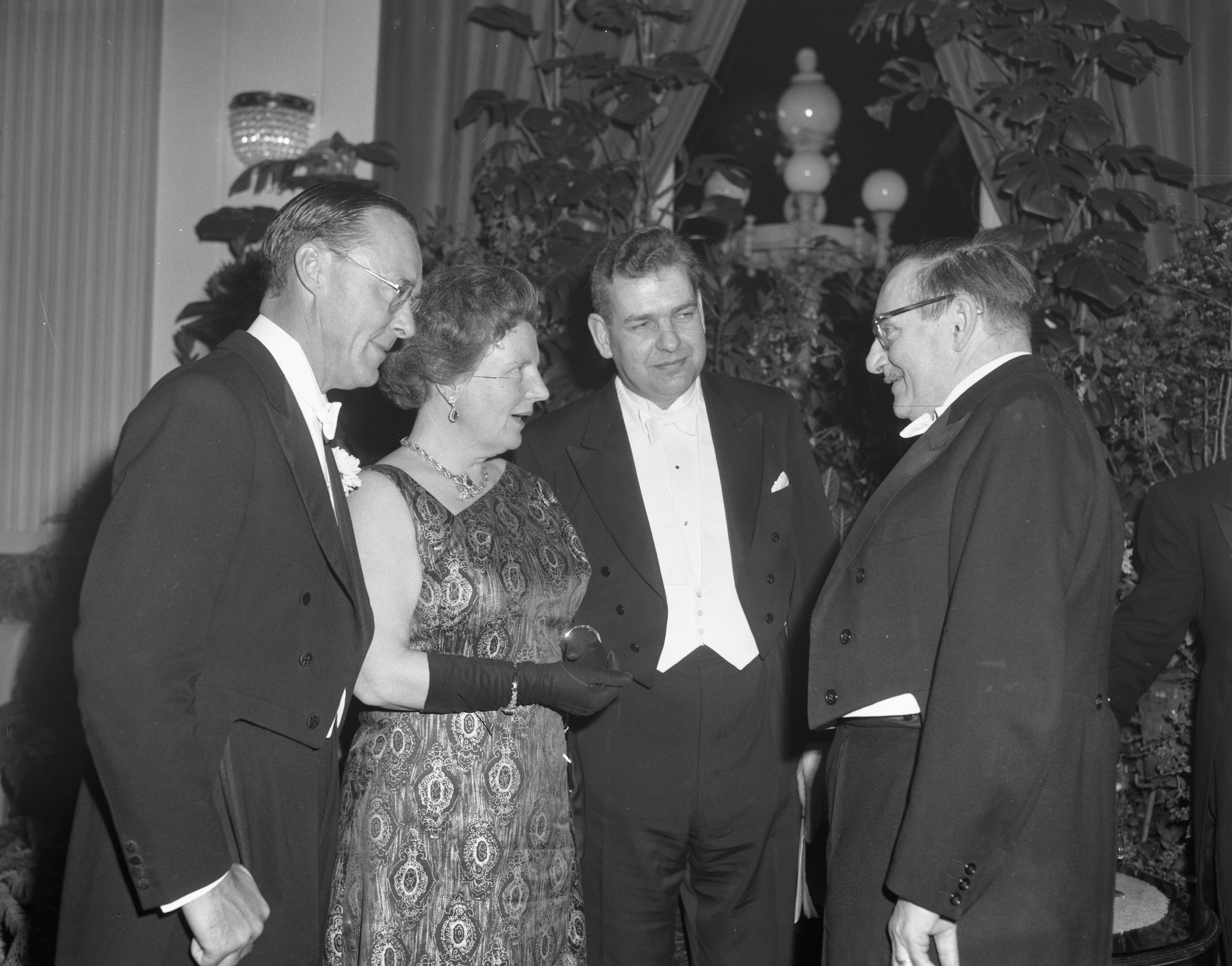 Collectie / Archief : Fotocollectie Anefo Reportage / Serie : [ onbekend ] Beschrijving : Gala-avond in de Stadsschouwburg in Amsterdam ter gelegenheid van Boekenweek 1962. Vlnr. Prins Bernhard, koningin Juliana, W.J. Schouten (CPNB) en C.J. Kelk (letterkundige en criticus) Datum : 30 maart 1962 Locatie : Amsterdam Trefwoorden : feestkleding, schouwburgen Persoonsnaam : Bernhard (prins Nederland), Juliana (koningin Nederland), Kelk, C.J., Schouten, W. J. Fotograaf : Bilsen, Joop van / Anefo Auteursrechthebbende : Nationaal Archief Materiaalsoort : Negatief (zwart/wit) Nummer archiefinventaris : bekijk toegang 2.24.01.04 Bestanddeelnummer : 913-7071